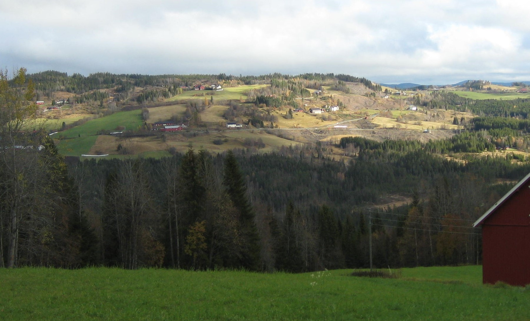 Aust-Torpa med Finni og Kinn midt på bildet